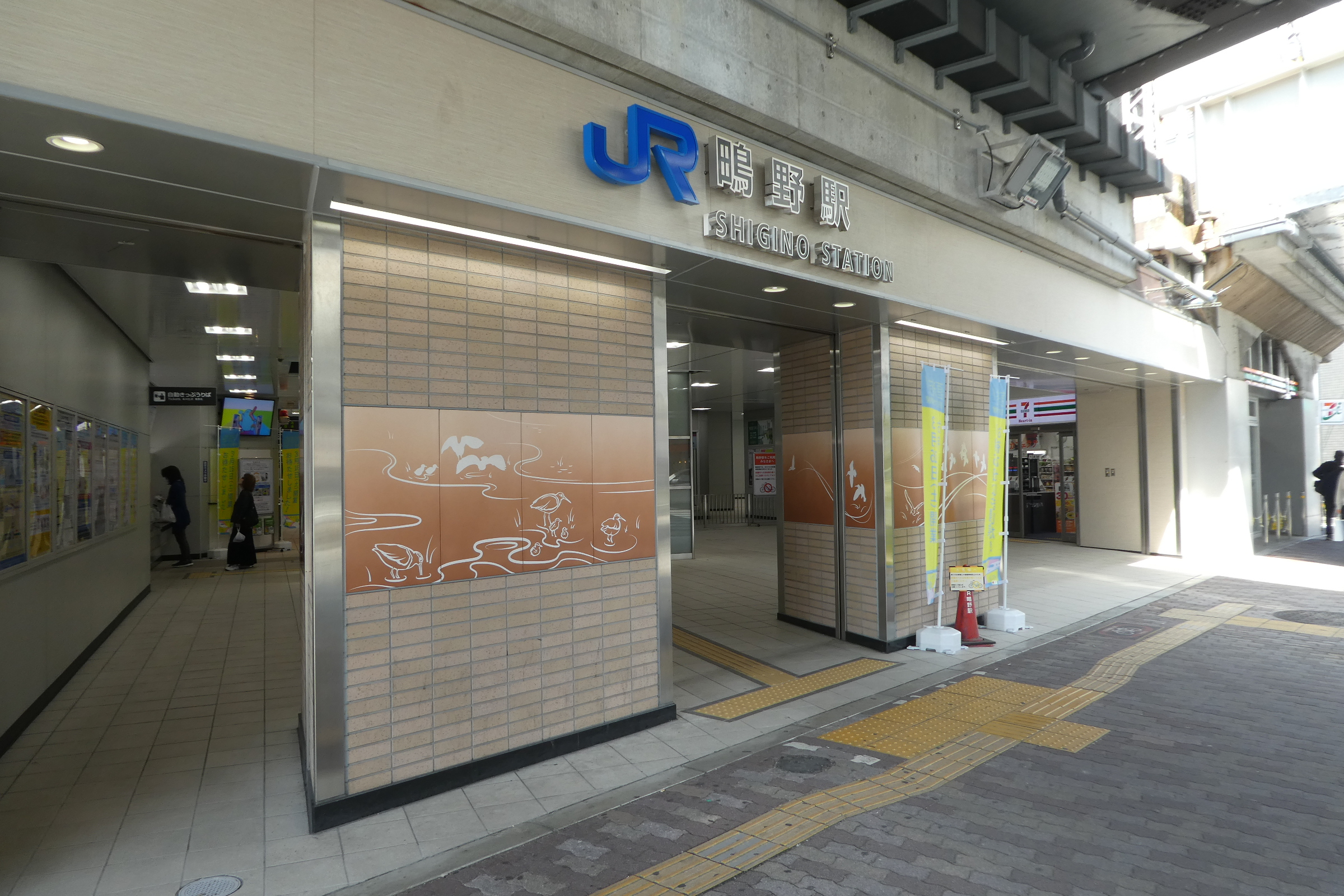 JR学研都市線、おおさか東線の鴫野駅